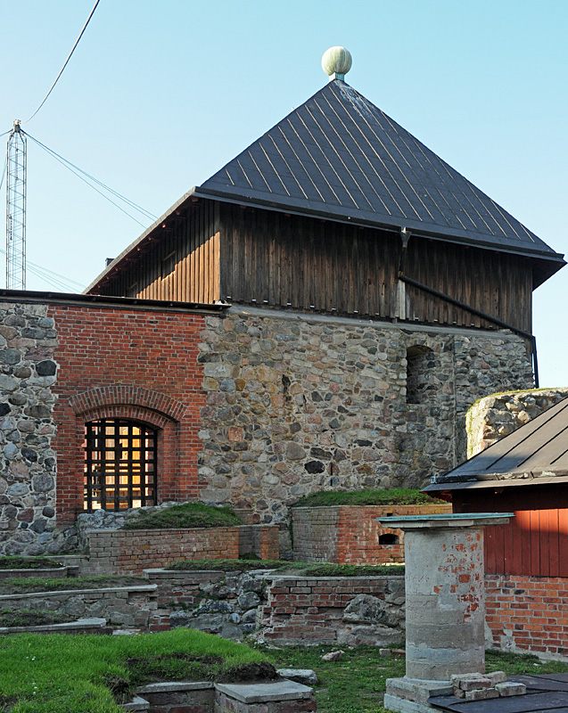 Fängelsetornet, Nyköpingshus